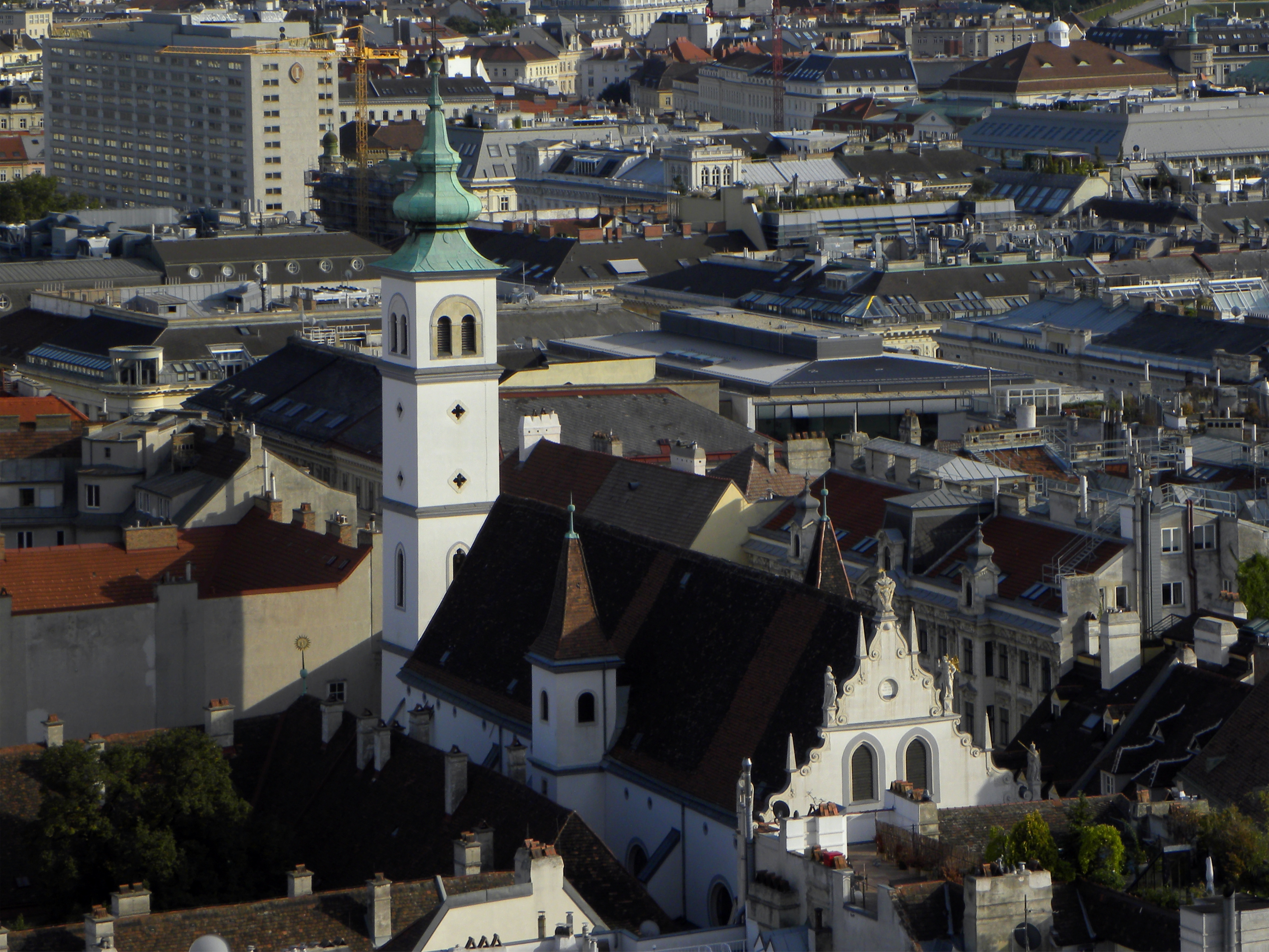 Die Franziskanerkirche in Wien, vom Stephansdom aus aufgenommen